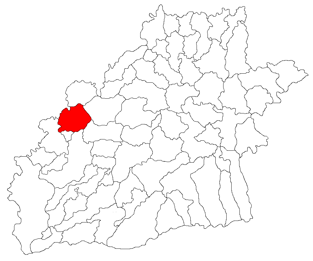 Categorie:Hărţi ale judeţului Sibiu